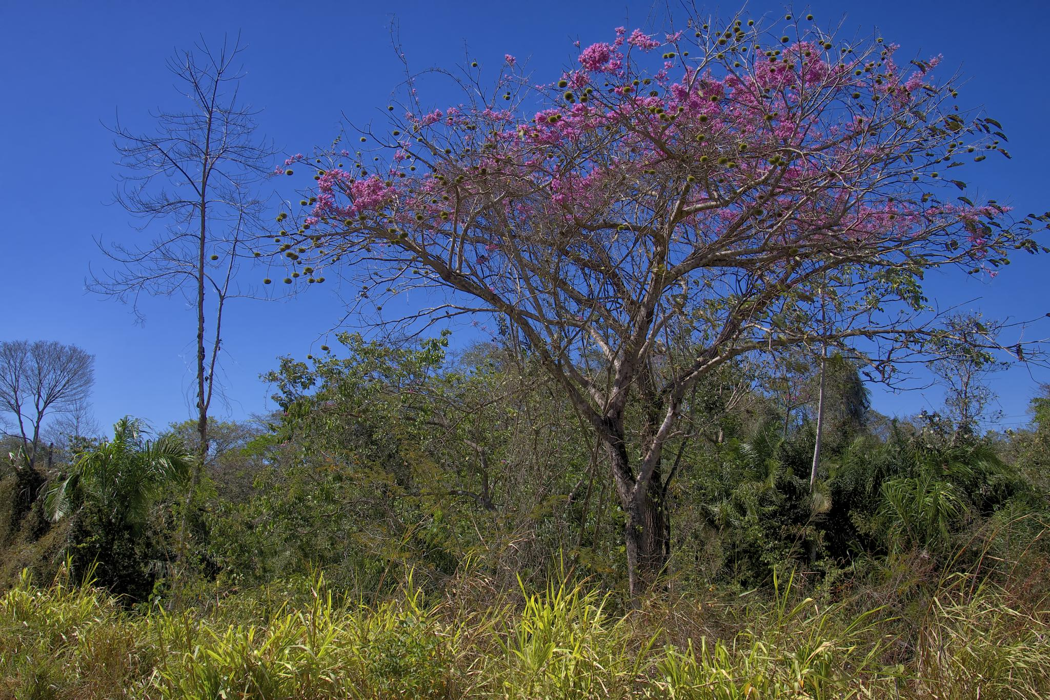 De Balsas a Chapada das Mesas